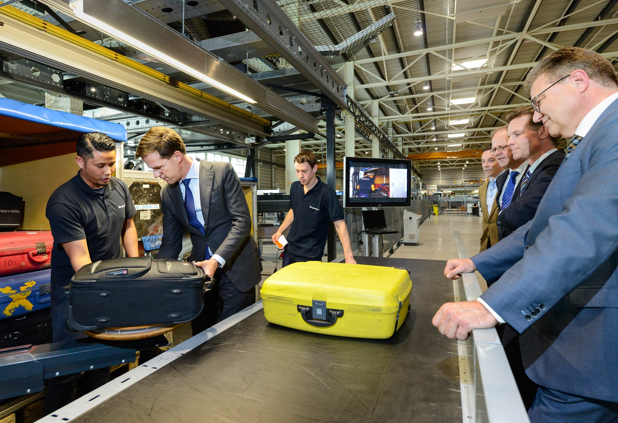 Minister-president Mark Rutte op werkbezoek bij Vanderlande in Veghel, Noord-Brabant. Een bedrijf dat zich bezighoudt met het automatiseren van logistieke processen.